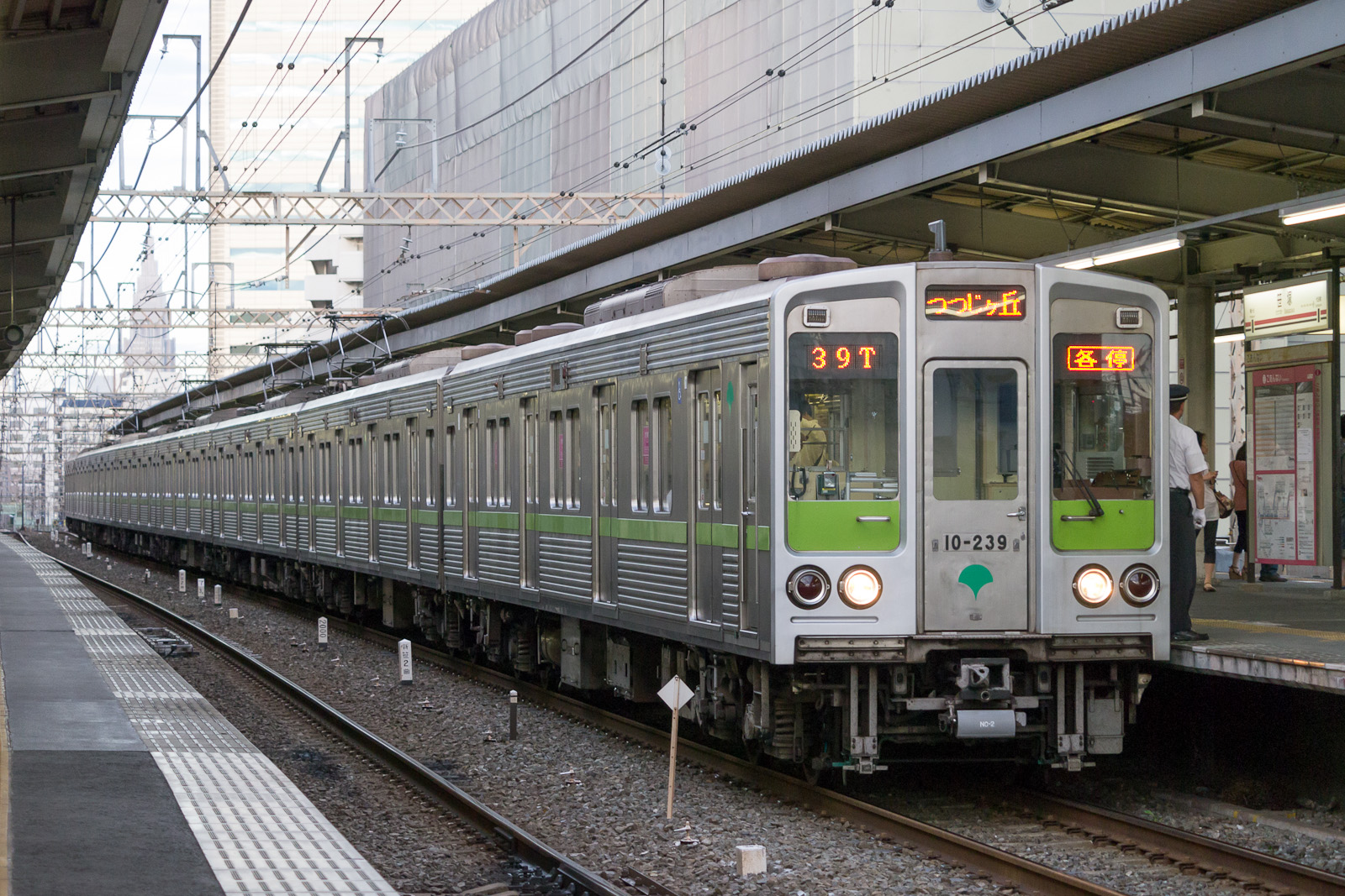 都営地下鉄新宿線10-000形、10-230F、笹塚駅。